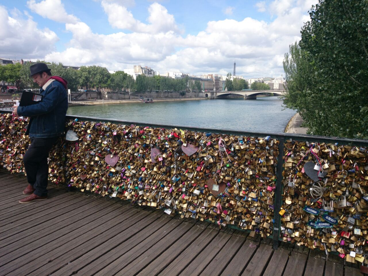 Puente de las artes (Puente de los candados), Francia. Junio,2014.